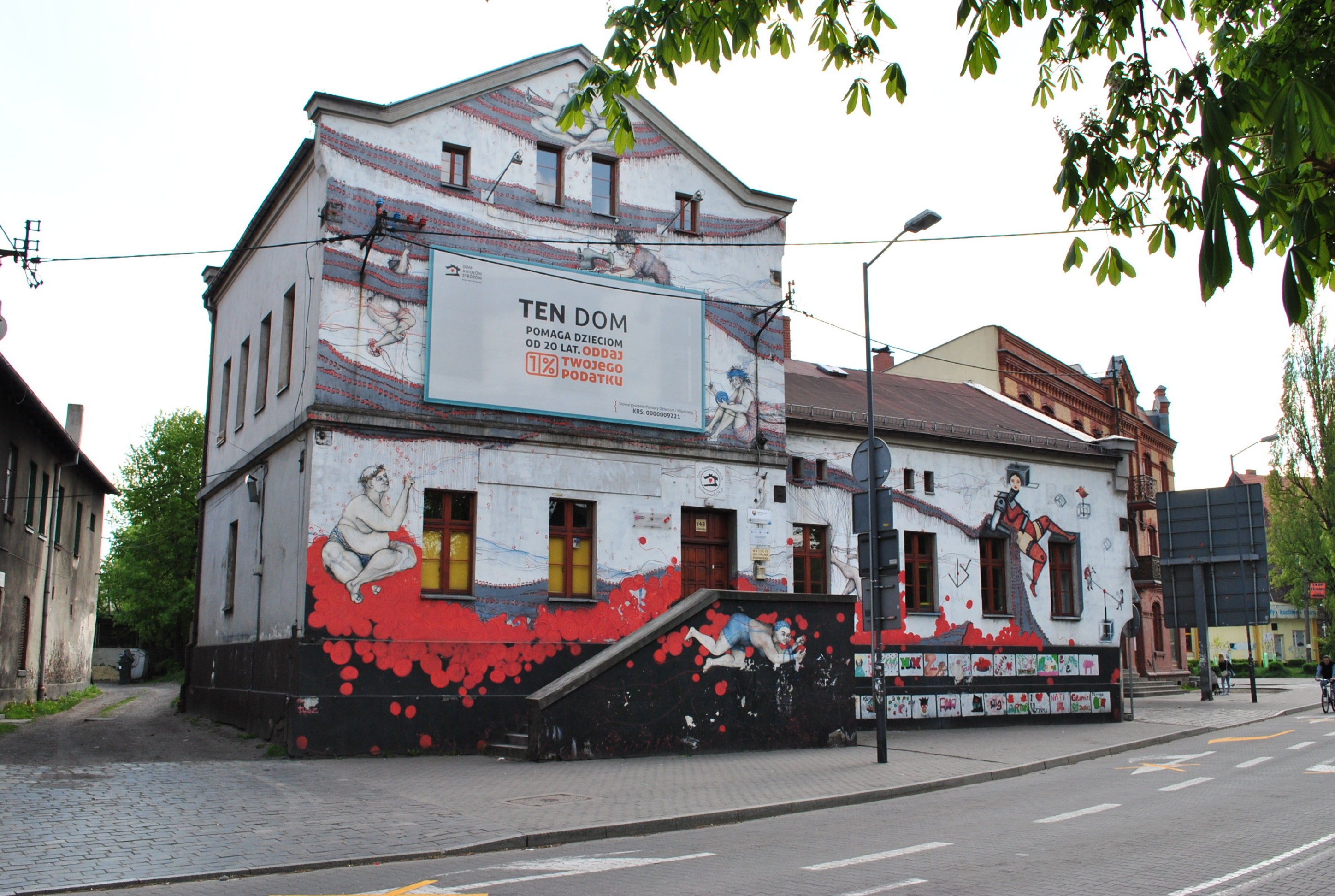 Katowice, Załęże. Siedziba Domu Aniołów Stróżów przy ul. Gliwickiej